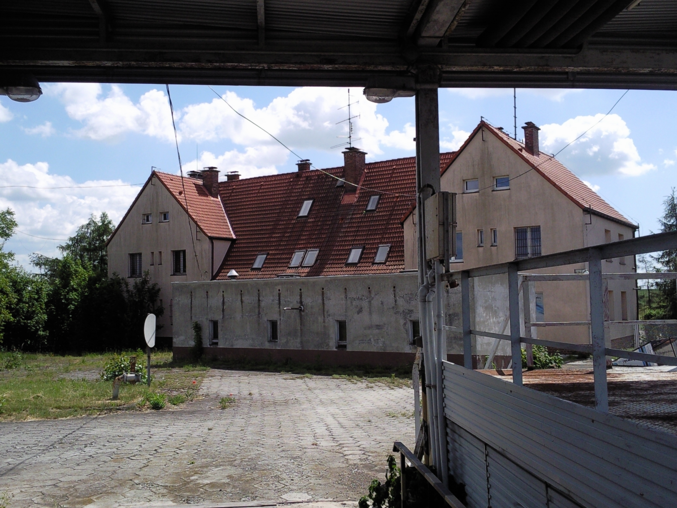 Przejście graniczne Pietraszyn-Sudice i Graniczna Placówka Kontrolna Straży Granicznej w Pietraszynie, potem Placówka Straży Granicznej w Pietraszynie - widok od strony placu